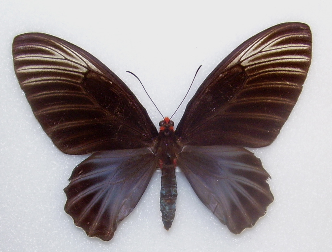 Atrophaneuera nox Upperside West Java